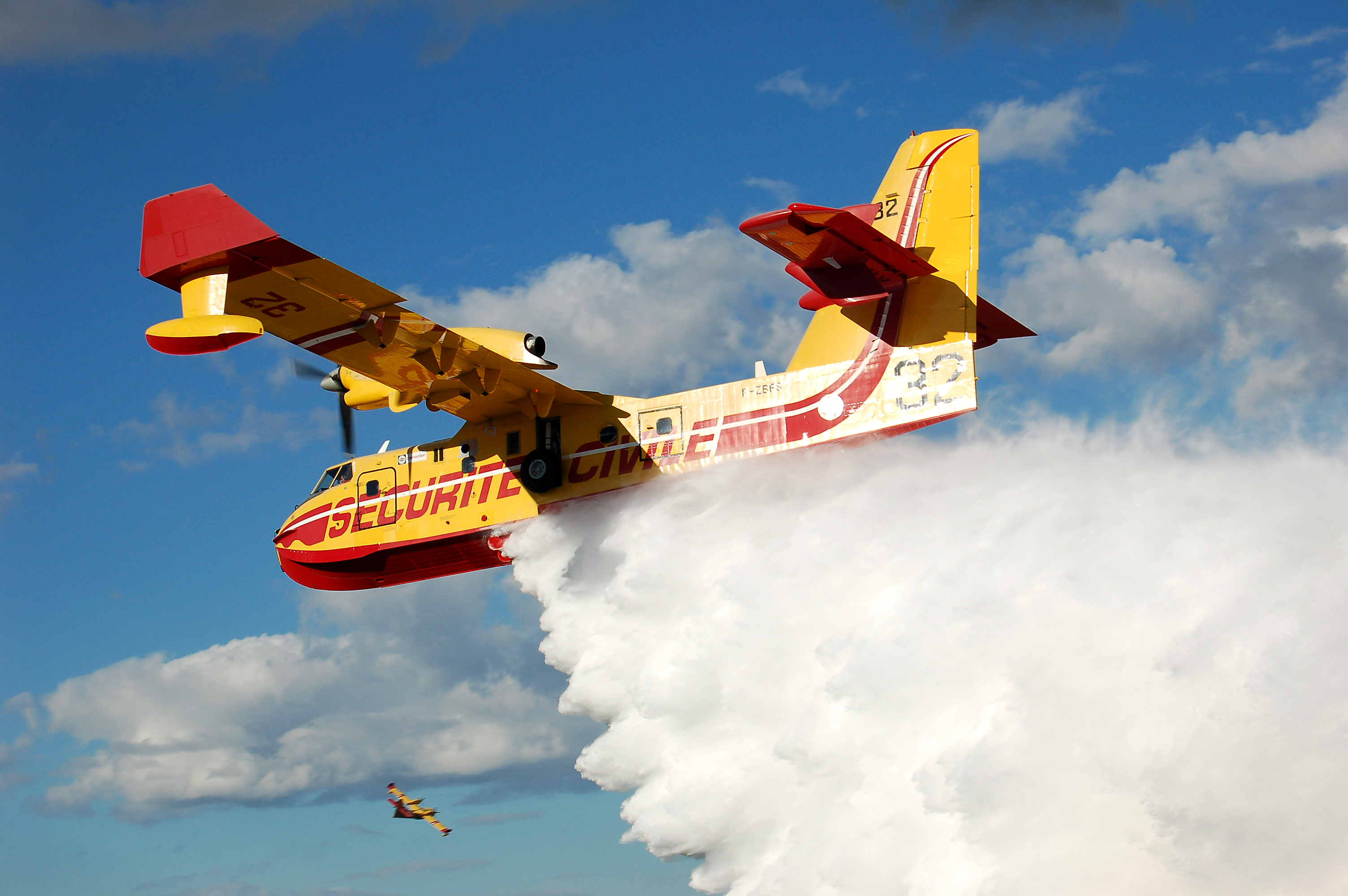 related photo Feu de mai 2006 sur le camp des Garrigues, POULX France. Les Canadairs, arrivés de Marignane larguent, aidés de Tracker et du premier HD8 reçu à cette base. Sur cette photo, le Pélican 32 . Le NGF est de 183mètres. Collection Gérard JOYON environnement protection patrimoine. Camp des Garrigues NIMES. Photo avec signature incrustée.